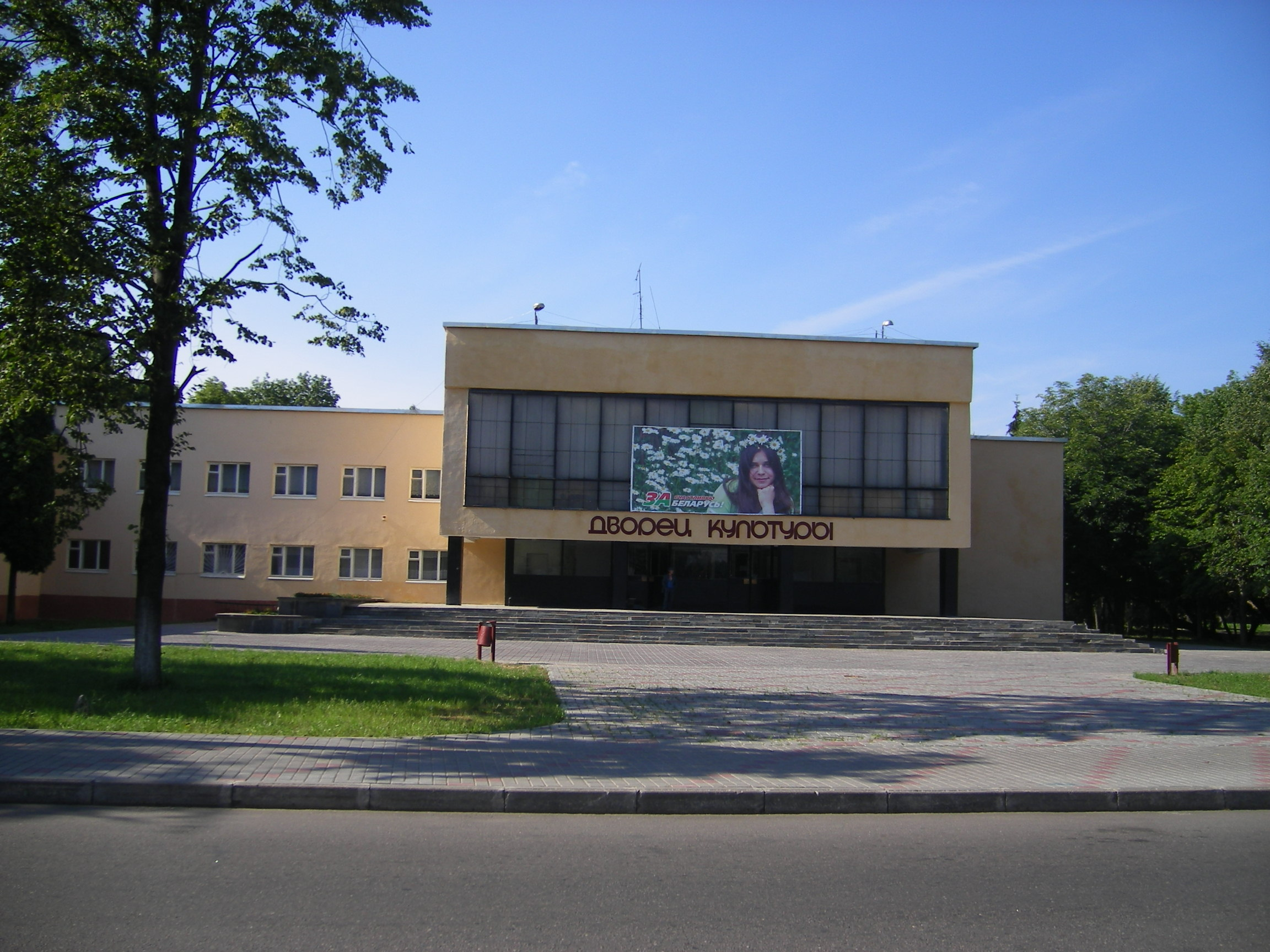 Byarozavka Culture Centre